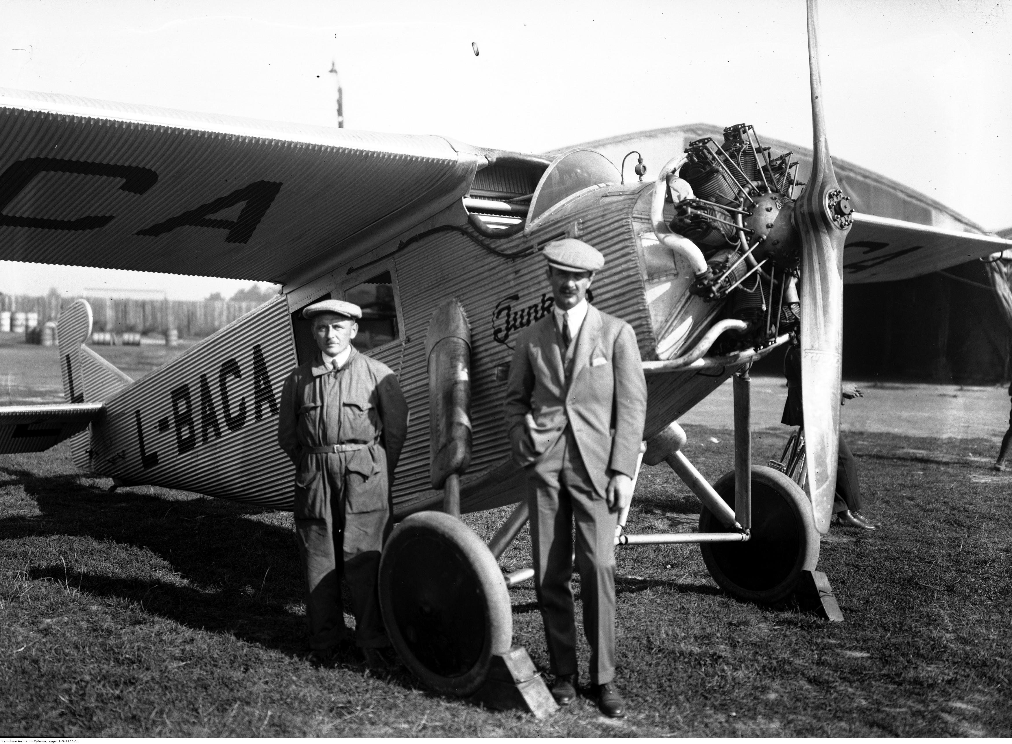 Awionetka Junkers K16; Kraków, wrzesień 1928. Koncern Ilustrowany Kurier Codzienny - Archiwum Ilustracji. Sygnatura: 1-S-1105-1